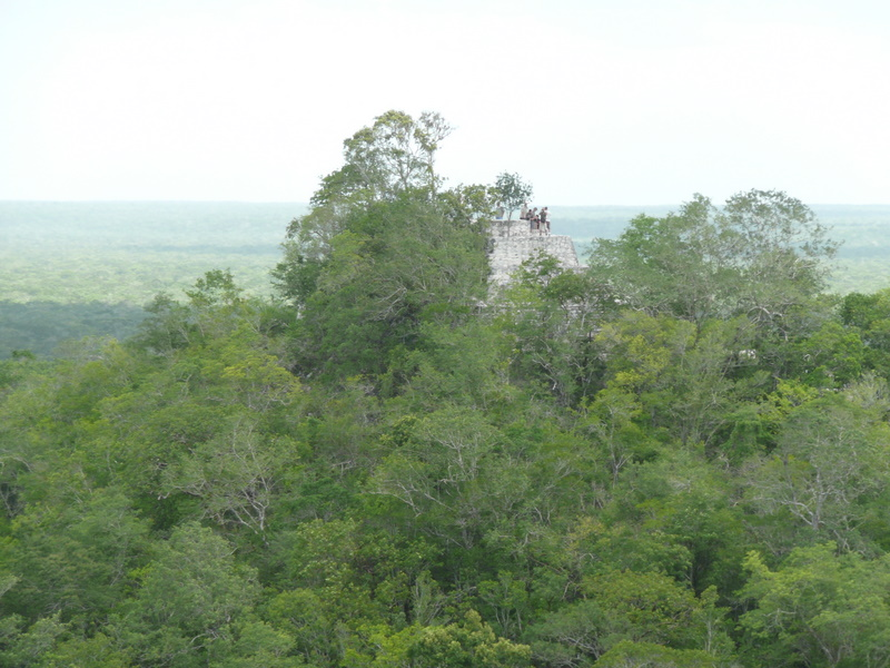 Zona arqueológica de Calakmul.